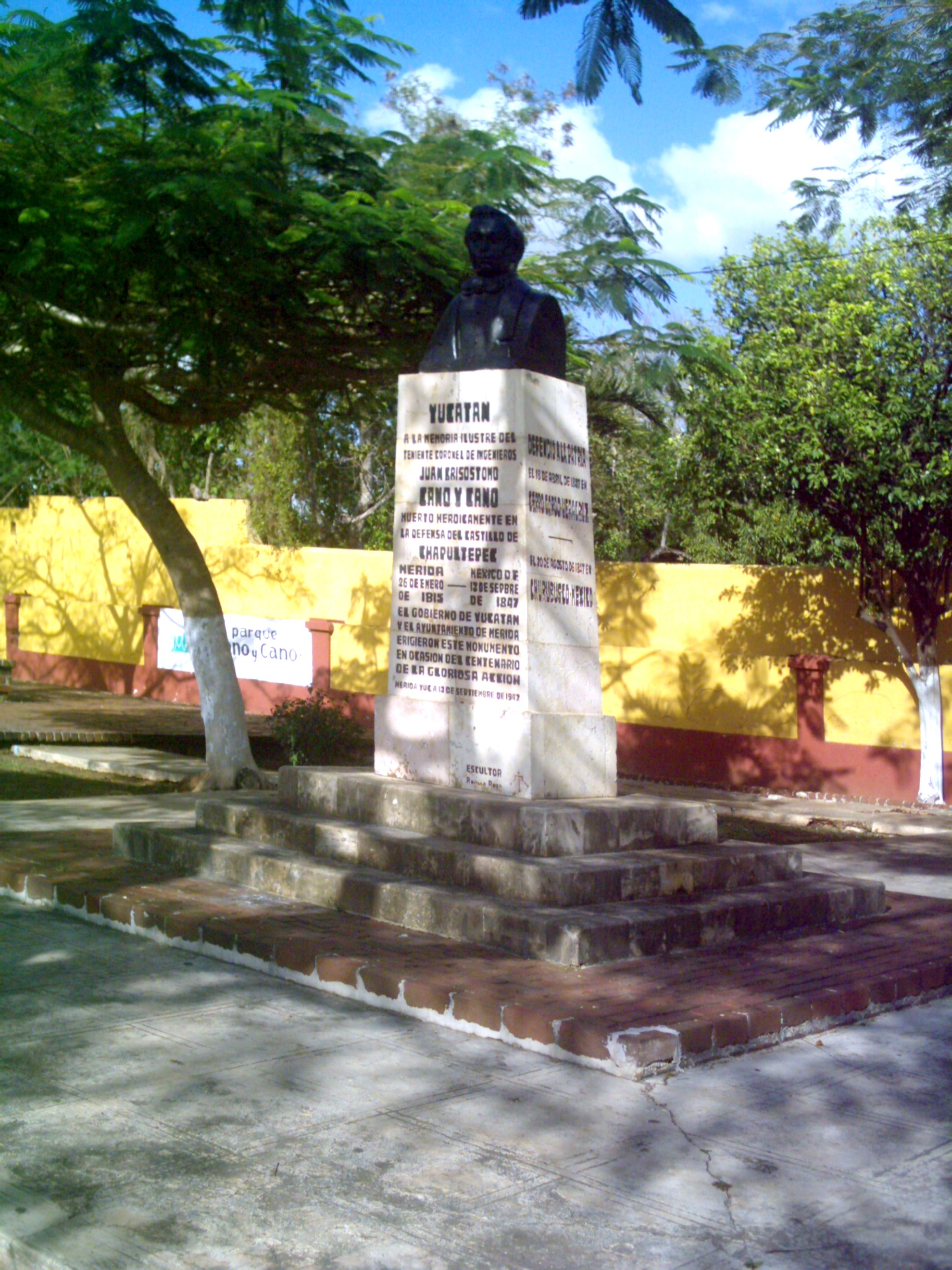 Busto al Gral. Juan Crisóstomo Cano y Cano, hecho por el escultor Rómulo Rozo en 1942.